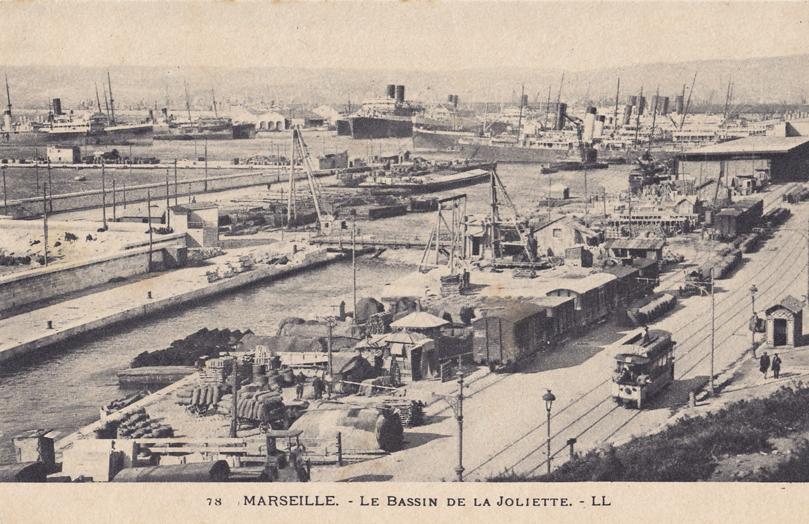 Carte postale ancienne éditée par LL, n°78 : MARSEILLE - Le Bassin de la Joliette